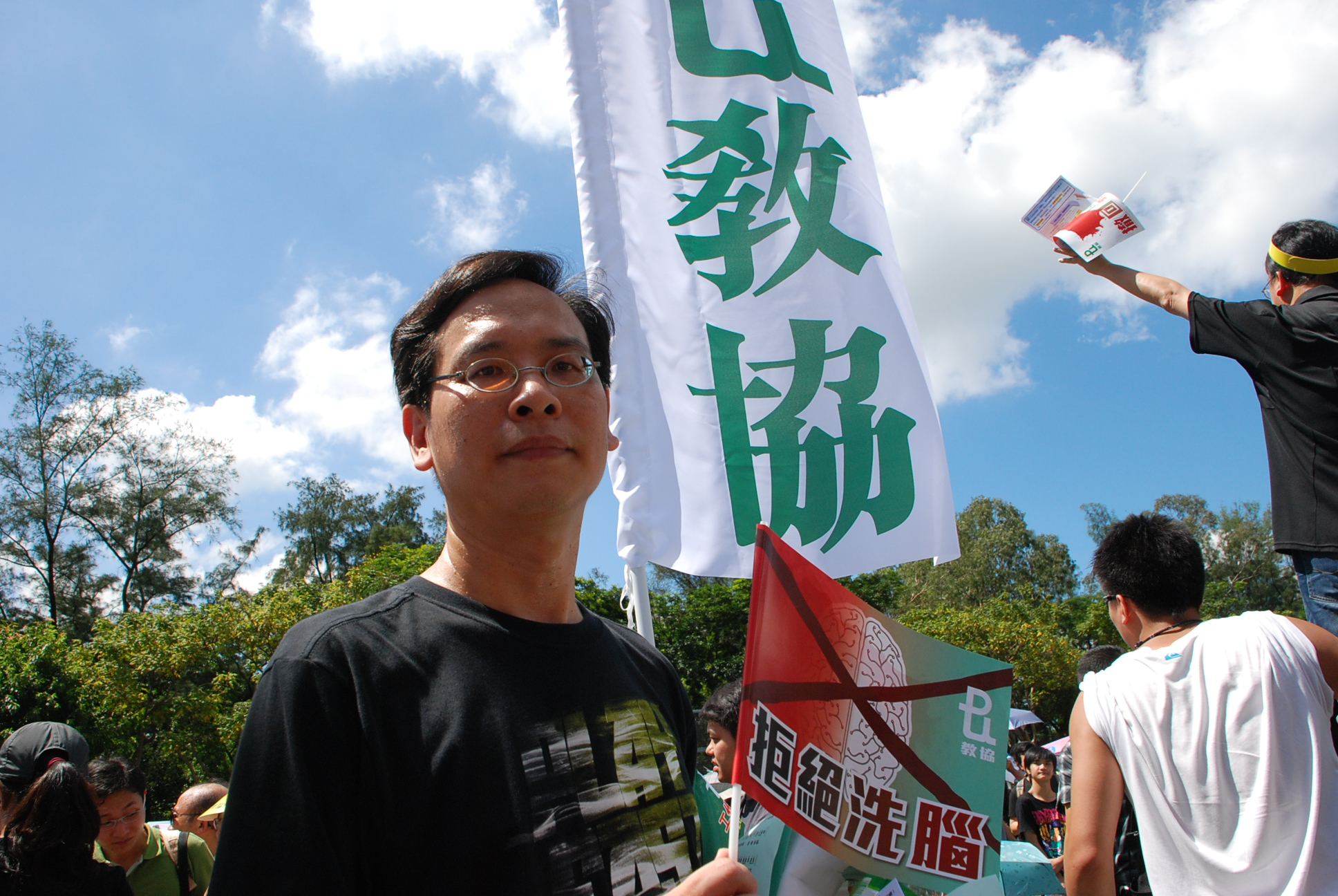 教協總幹事葉建源表示，香港最近出現反國民教育浪潮與9月的立法會選舉無關